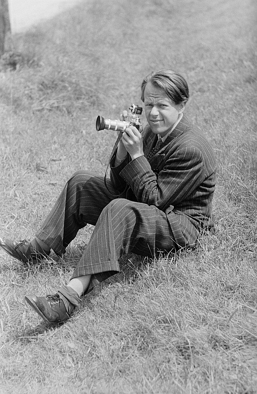 Original image description from the Deutsche Fotothek Portrait Roger Rössings mit Kamera